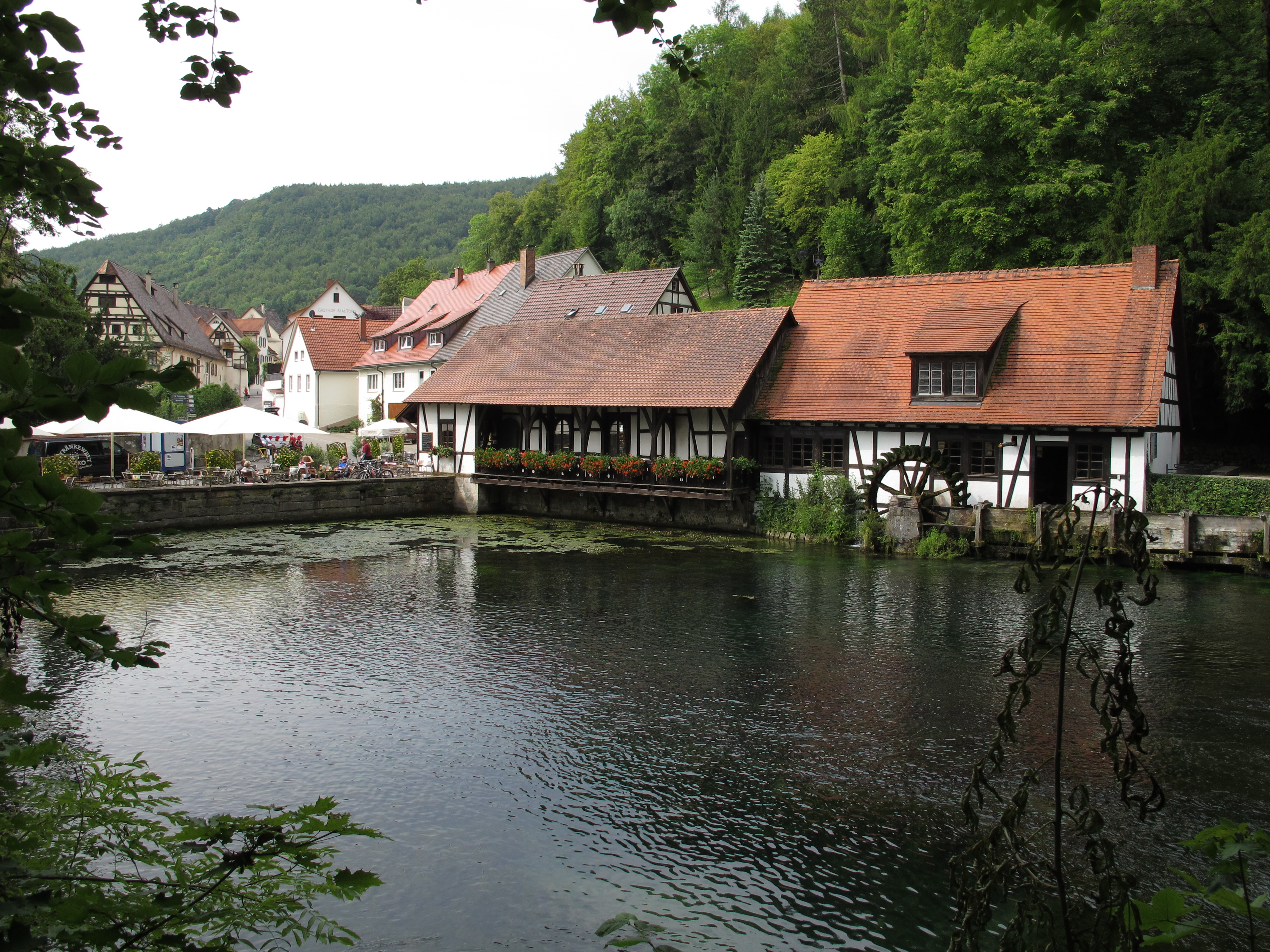 Blaubeuren: historisches Hammerwerk am Blautopf